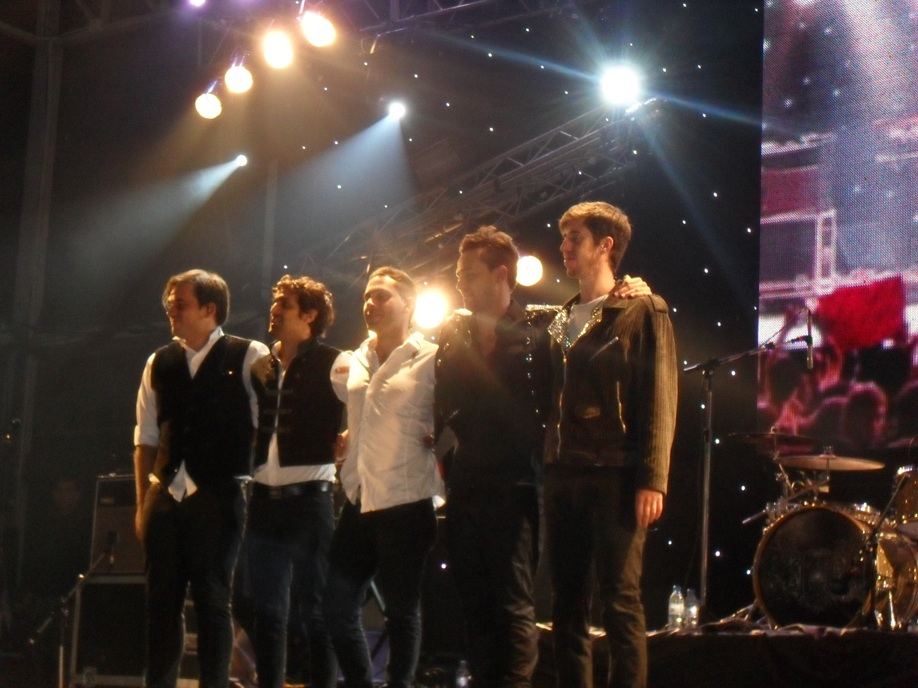 Tan Biónica luego de un concierto en la ciudad de Sunchales, provincia de Santa Fe, Argentina